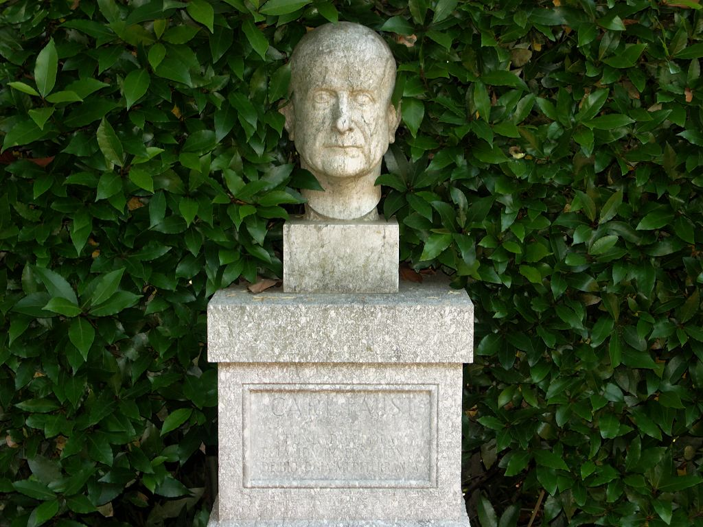 Descripción: Carl Faust (Fundador de la Estación Internacional de Biología Mediterránea, Marimurtra) Fecha: 22/06/2005 Hora: 11:36 Cámara: DiMAGE A2 ISO: 64 Tv: 1/80 Av: 4 Autor: aTarom